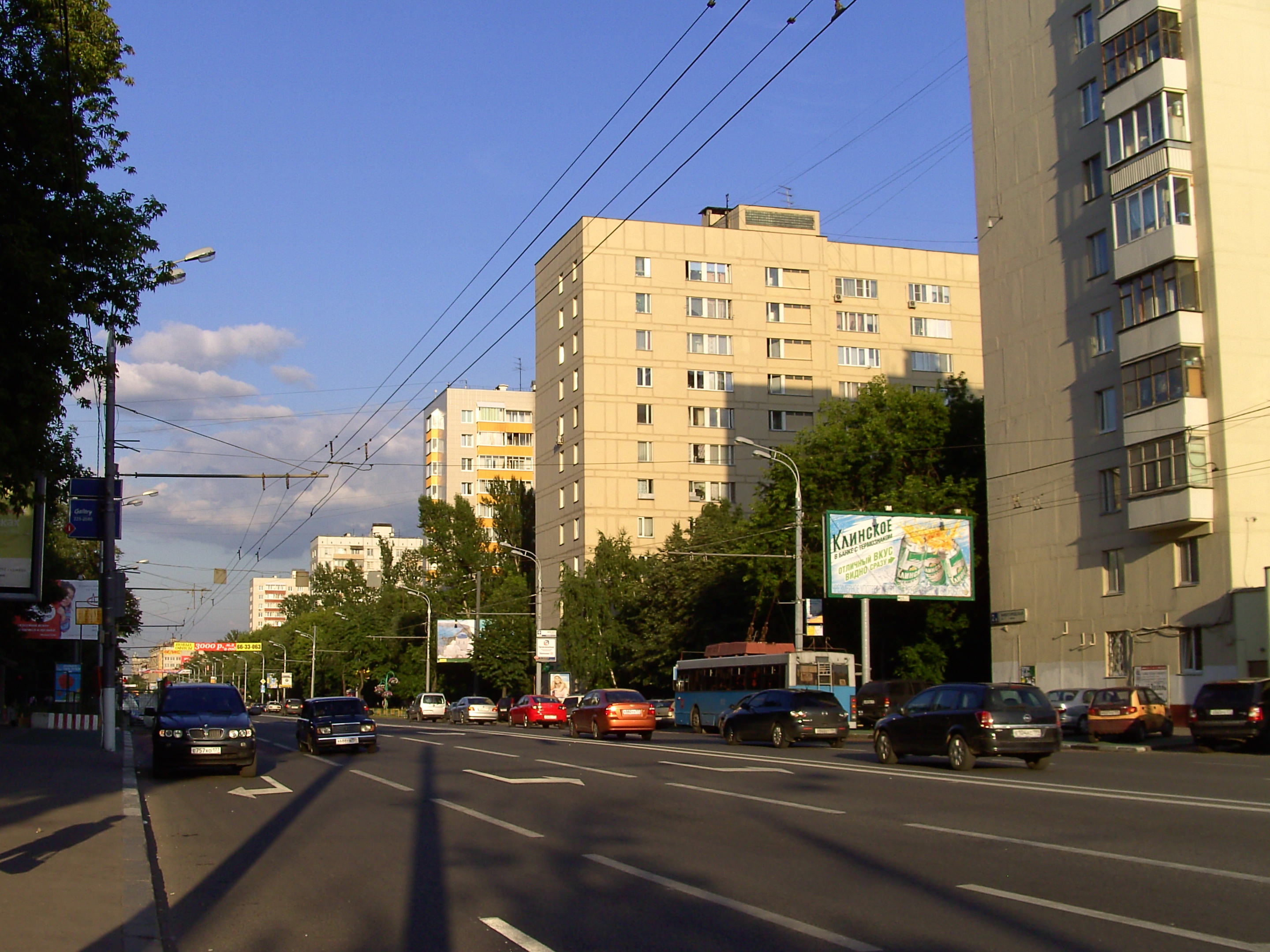 Нижегородская улица в Москве, начало, справа видны дома № 2,4,6 (№ 2 - обрезан). Фото сделано 7 июля 2009 года действительно в 20:22 по летнему времени (UTC+4).